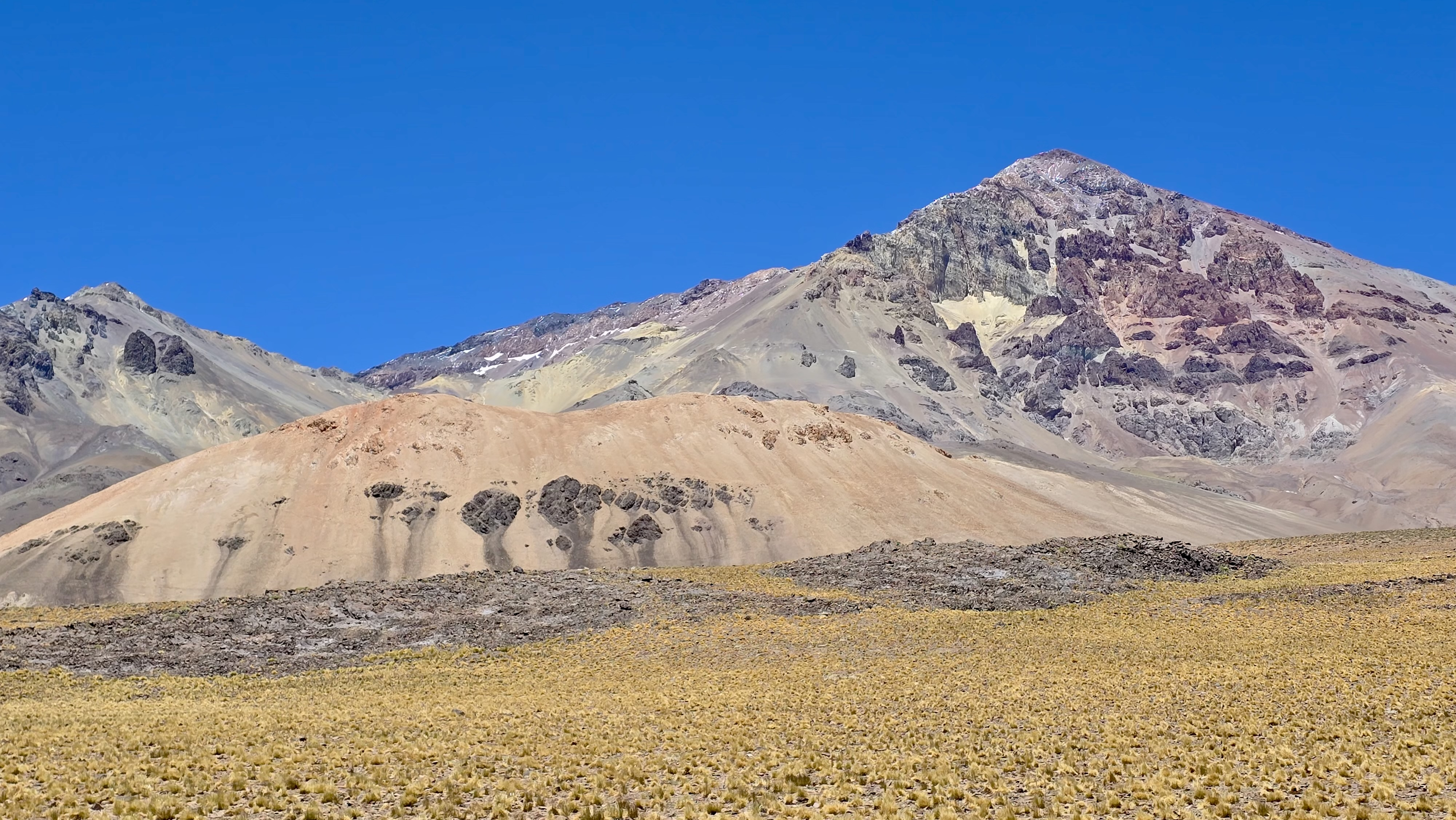 Faja en miniatura, bolsa de lana, estatuilla de spondylus, y plumas